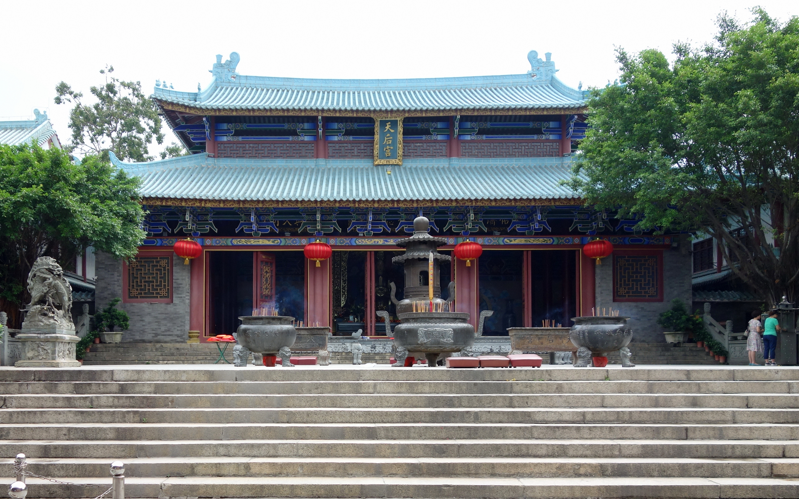 深圳市南山区赤湾天后宫